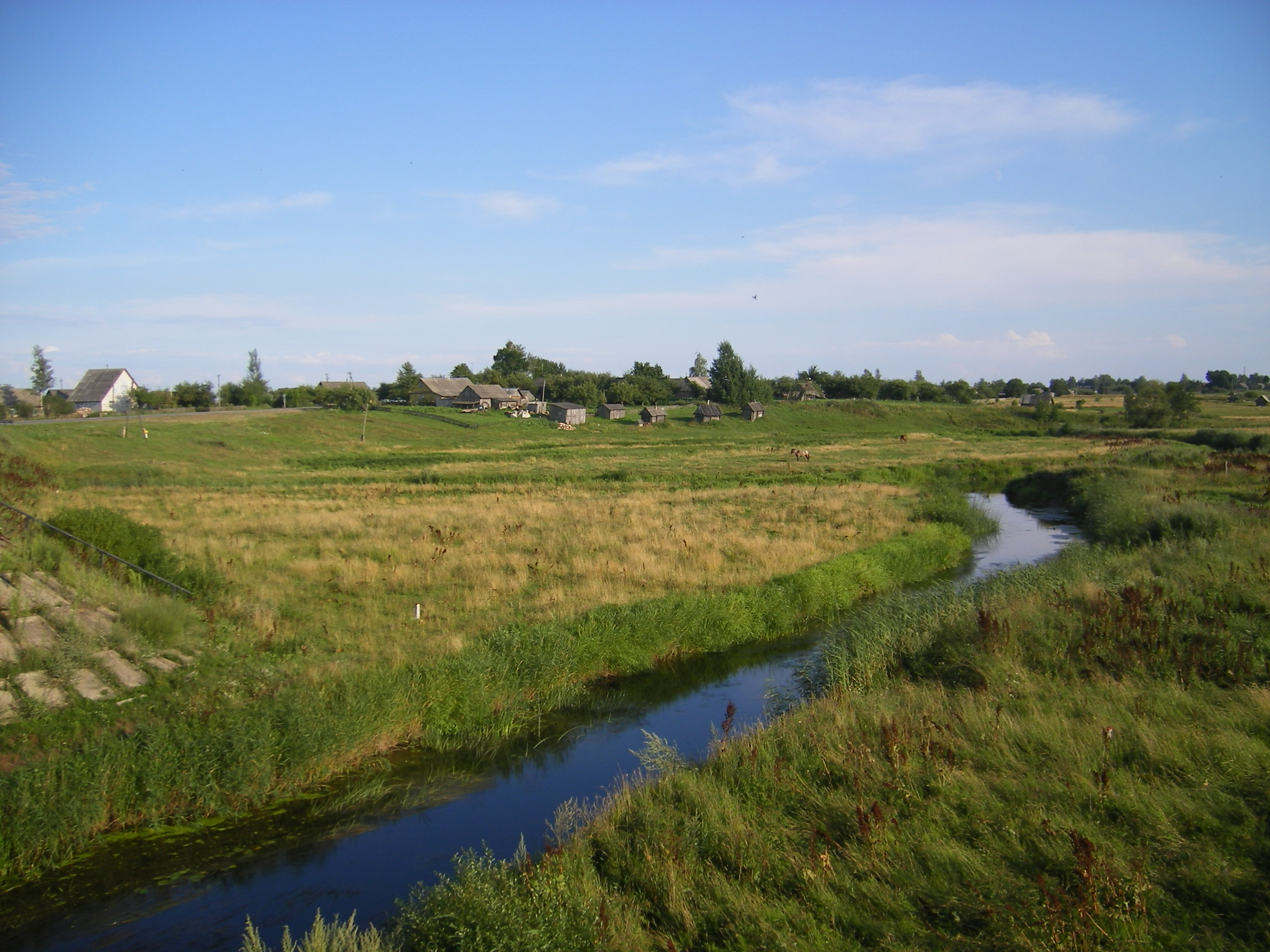 Birveta River near a village Kozyani, Braslav Raion